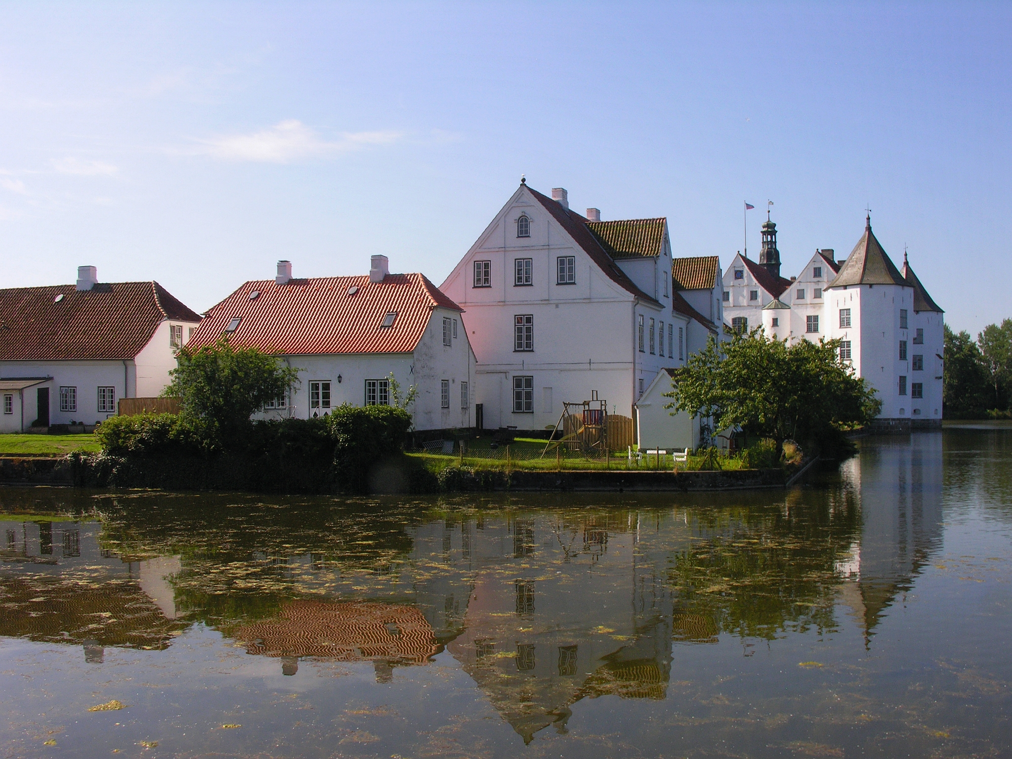 Kulturdenkmal Schloss Glücksburg 4.1k Wirtschaftsgebäude und Wasserschloss Nordwestseite - Schleswig-Holstein - Foto 2012 Wolfgang Pehlemann Steinberg/Ostsee DSCN0368